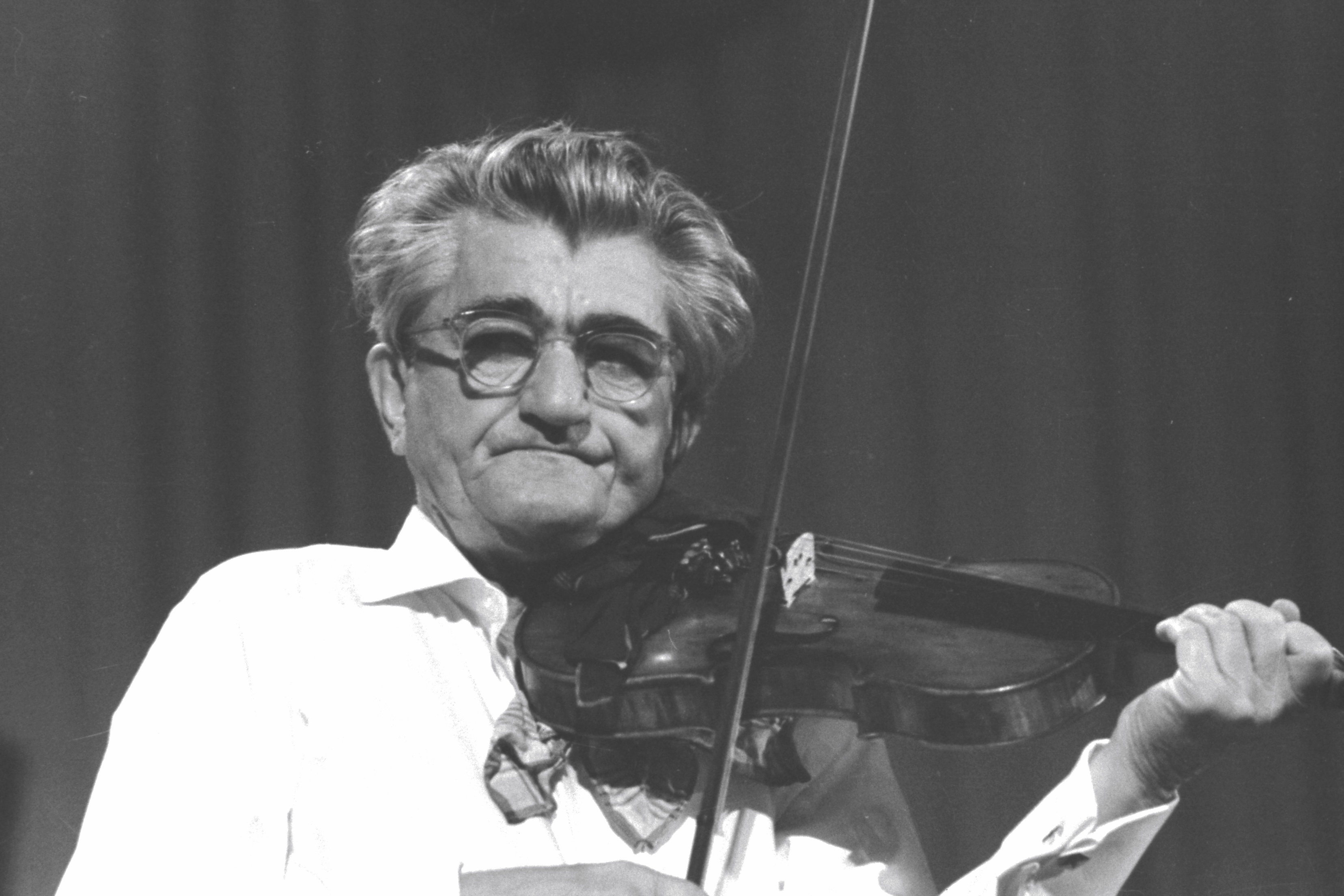 Vlastimir Pavlović Carevac (1895—1965), muzičar i dirigent, 1963. godine